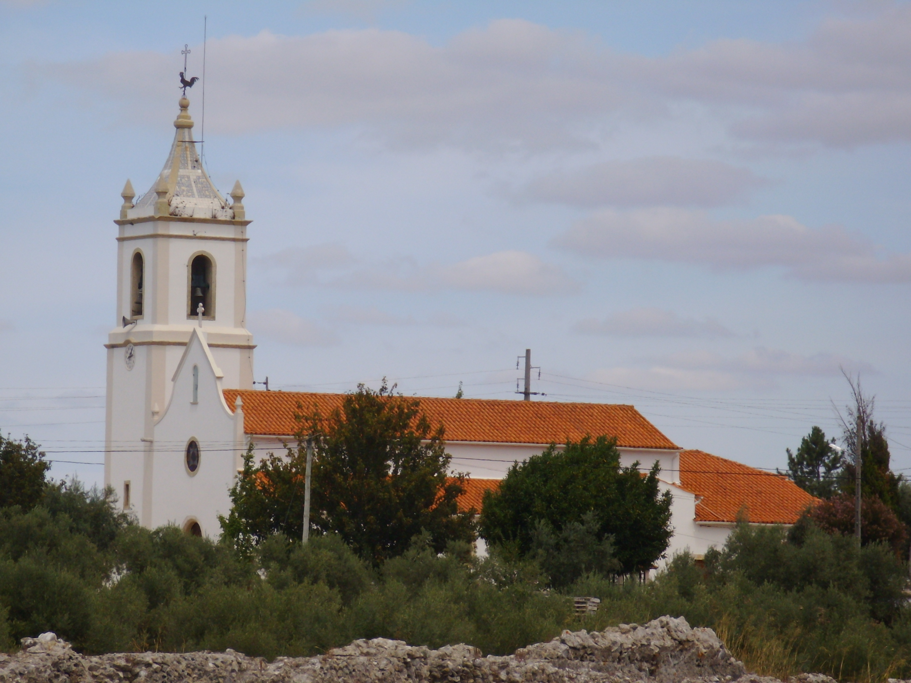 Igreja Matriz de Condeixa-a-Velha, freguesia de Condeixa-a-Velha, concelho de Condeixa-a-Nova, Distrito de Coimbra, Portugal.